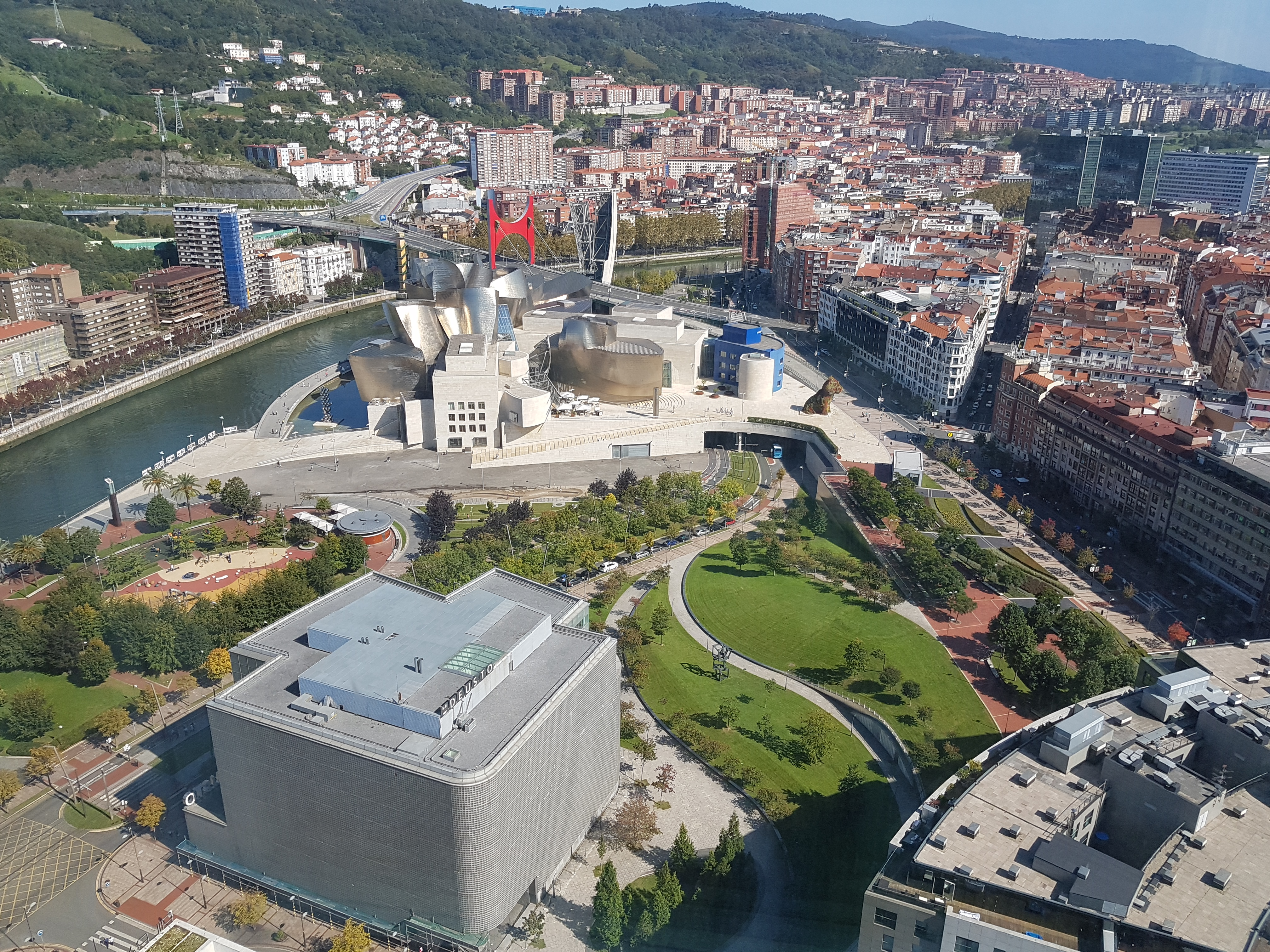 Abandoibarra.